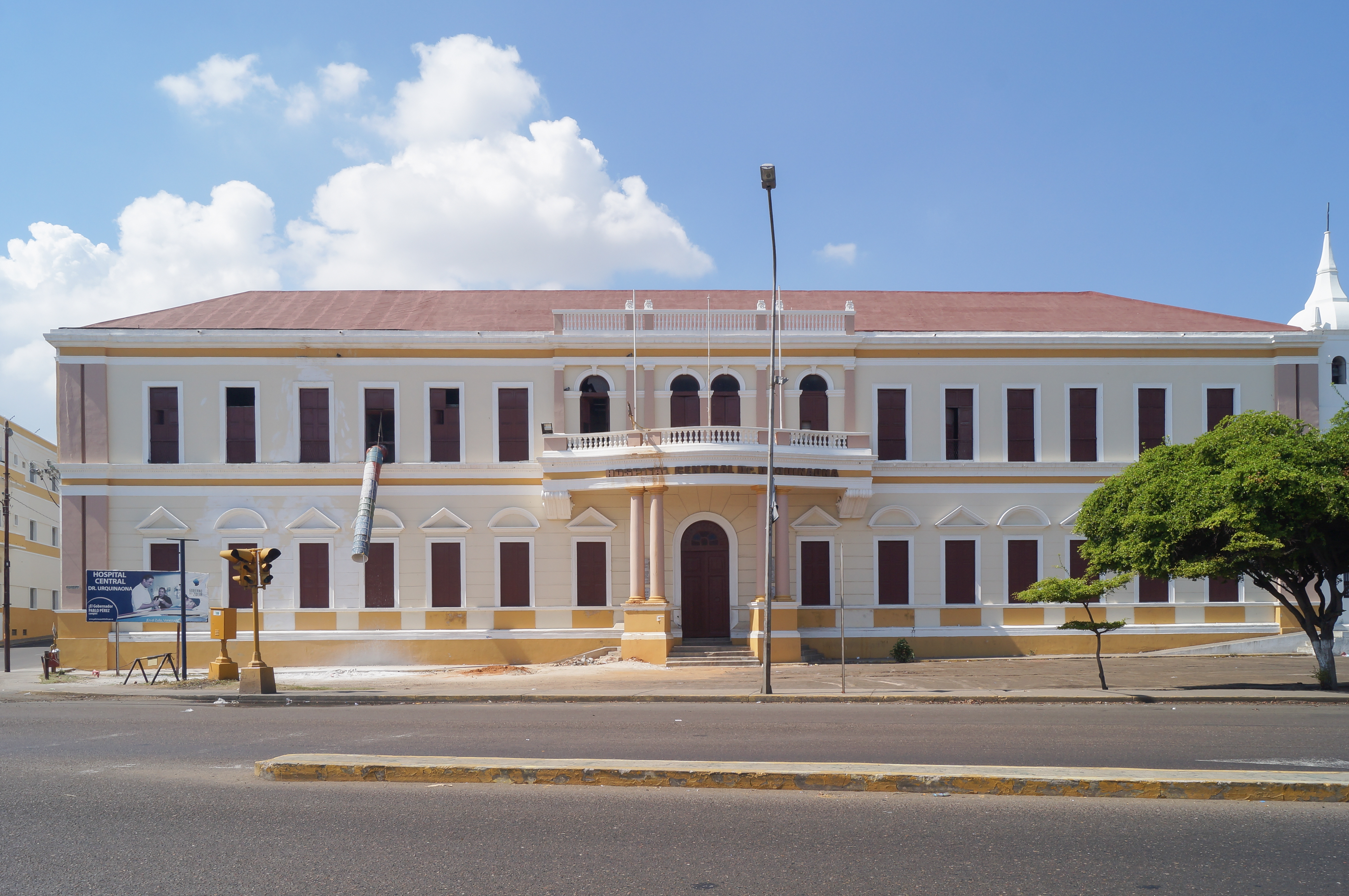 Es uno de los centros asistenciales en funcionamiento más antiguo del país. Existen datos que apuntan que está edificación data del siglo XVII (aprox. en 1608), en principio se levanto la capilla de Santa y luego dio paso al hospital, al lado de la edificación religiosa. Está edificación ha tenido varios nombres con el transcurrir de los años, entre ellos Hospital de Santa Ana, Casa de Beneficiencia y su actual nombre Hospital Central Doctor Urquinaona. La estructura original fue intervenida y remodelada a principios de 1865 y luego se reedificó en 1910. Para 1926 se reconstruyó agregándosele dos pisos más. Ubicada en la av. El Milagro. Maracaibo. Venezuela